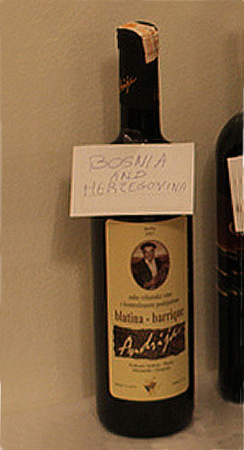 Vin de Bosnie-Herzégovine proposé à une dégustation internationale en Slovaquie